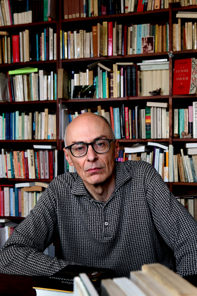 Frank Vande Veire